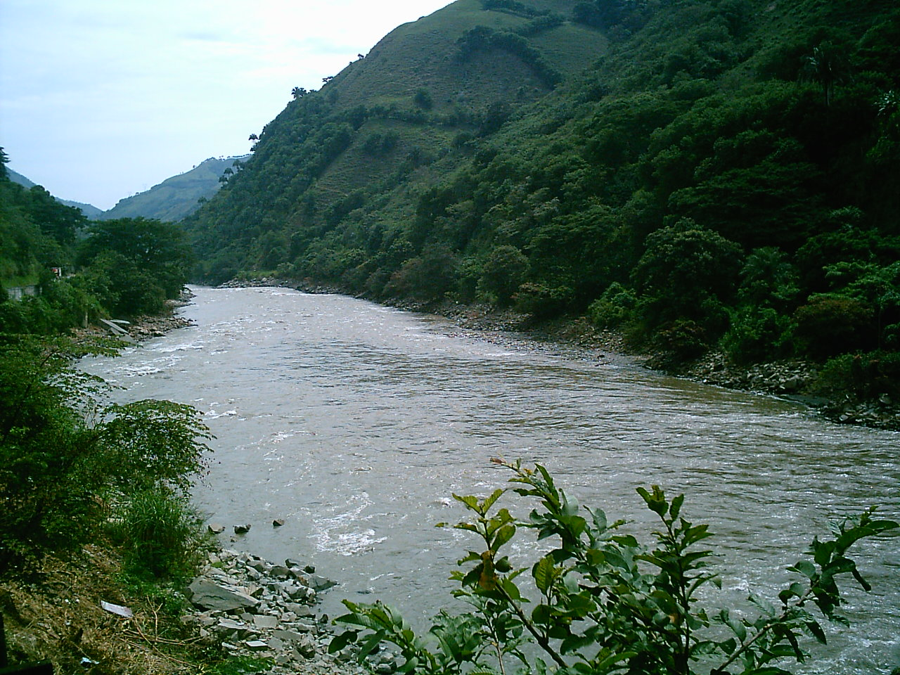 Río Cauca, a su paso entre los departamentos de Caldas y Antioquia